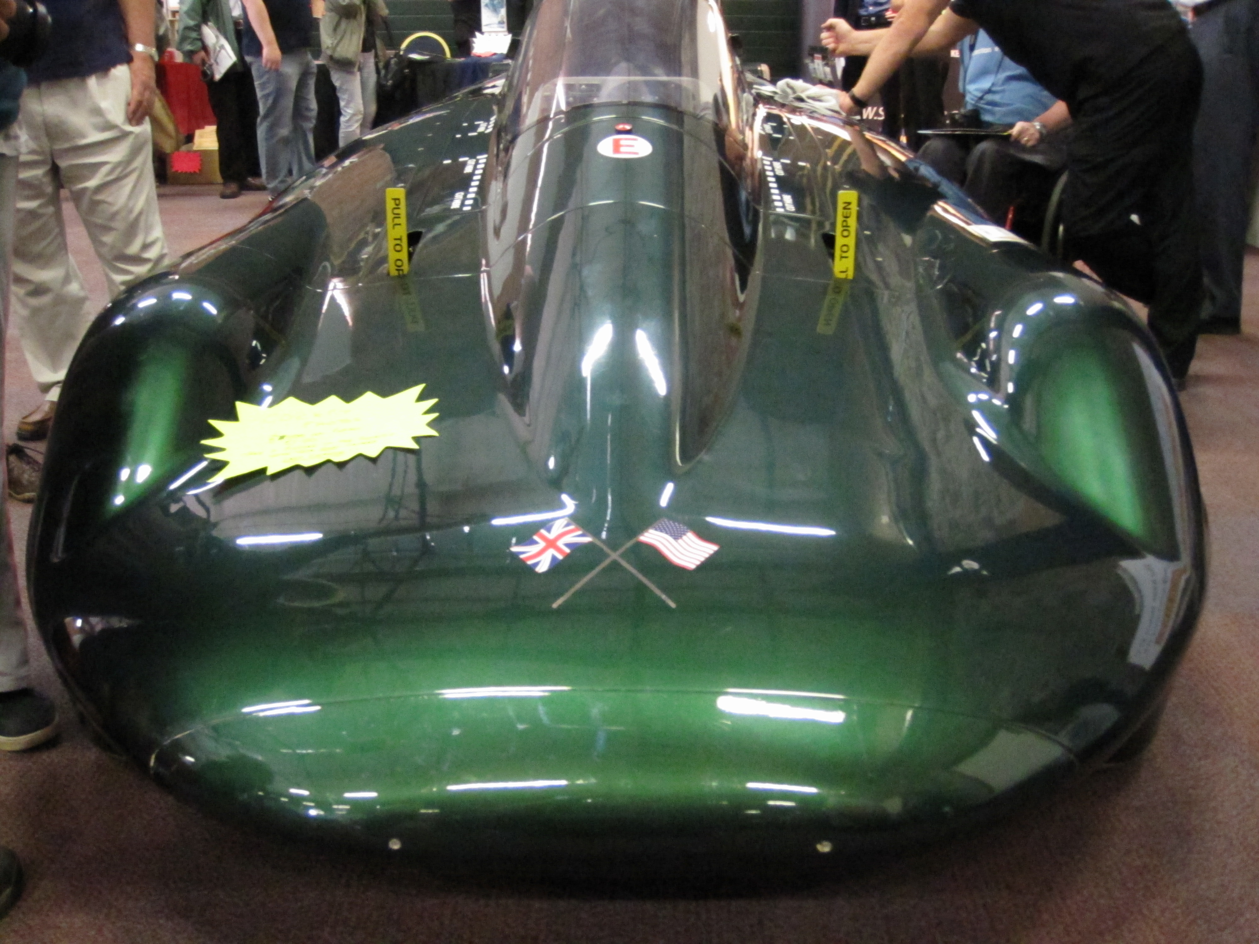 Imagination steam car